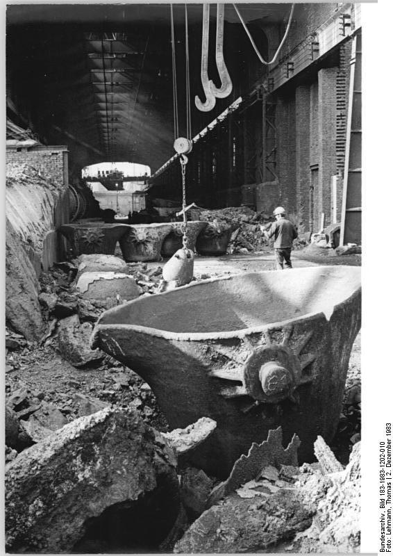 ADN-ZB-Lehmann-2.12.83-pra-Bez. Halle: Verwertung von Abfallprodukten - Erfolgreiche Versuche zum Einsatz von Silberglasbruch beim Schmelzen von Schwarzkupfer laufen gegenwärtig im Bereich Bessemerei der Kupfer- und Silberhütte "Fritz Beyling" Hettstedt. Eine Arbeitsgruppe der Bereiche Produktion-Technik und Forschung entwickelte ein Verfahren, das mit Hilfe des Einsatzes des bislang volkswirtschaftlich nicht genutzten Abfallproduktes eine qualitativ verbesserte Schmelze bei gleichzeitiger Senkung des Koksverbrauchs erbrachte.